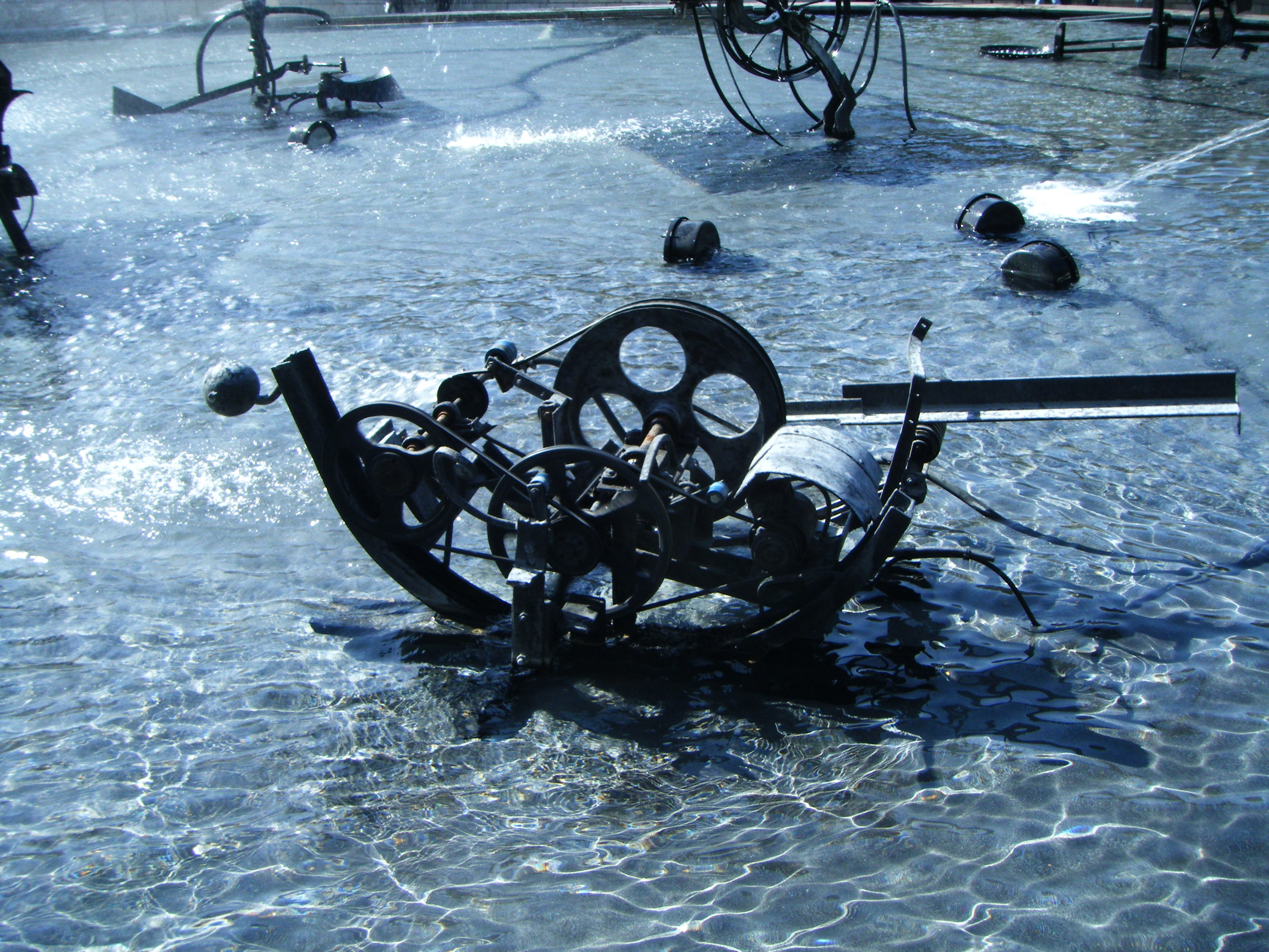 Der Fasnachts-Brunnen (auch: Tinguely-Brunnen bzw. Carnaval) Basel/Schweiz